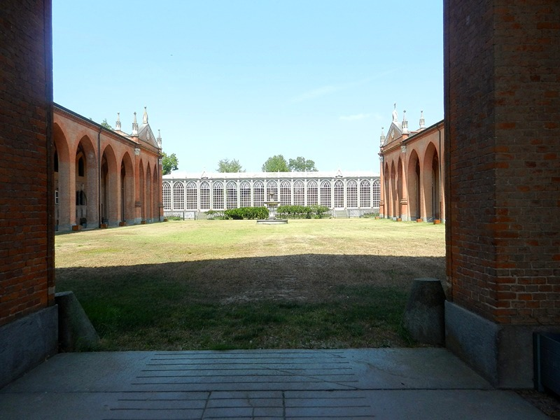 Racconigi - Cortile della Margaria del Castello Reale